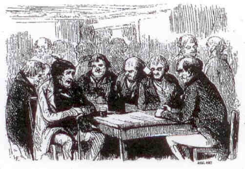 La goguette des Joyeux à Belleville.